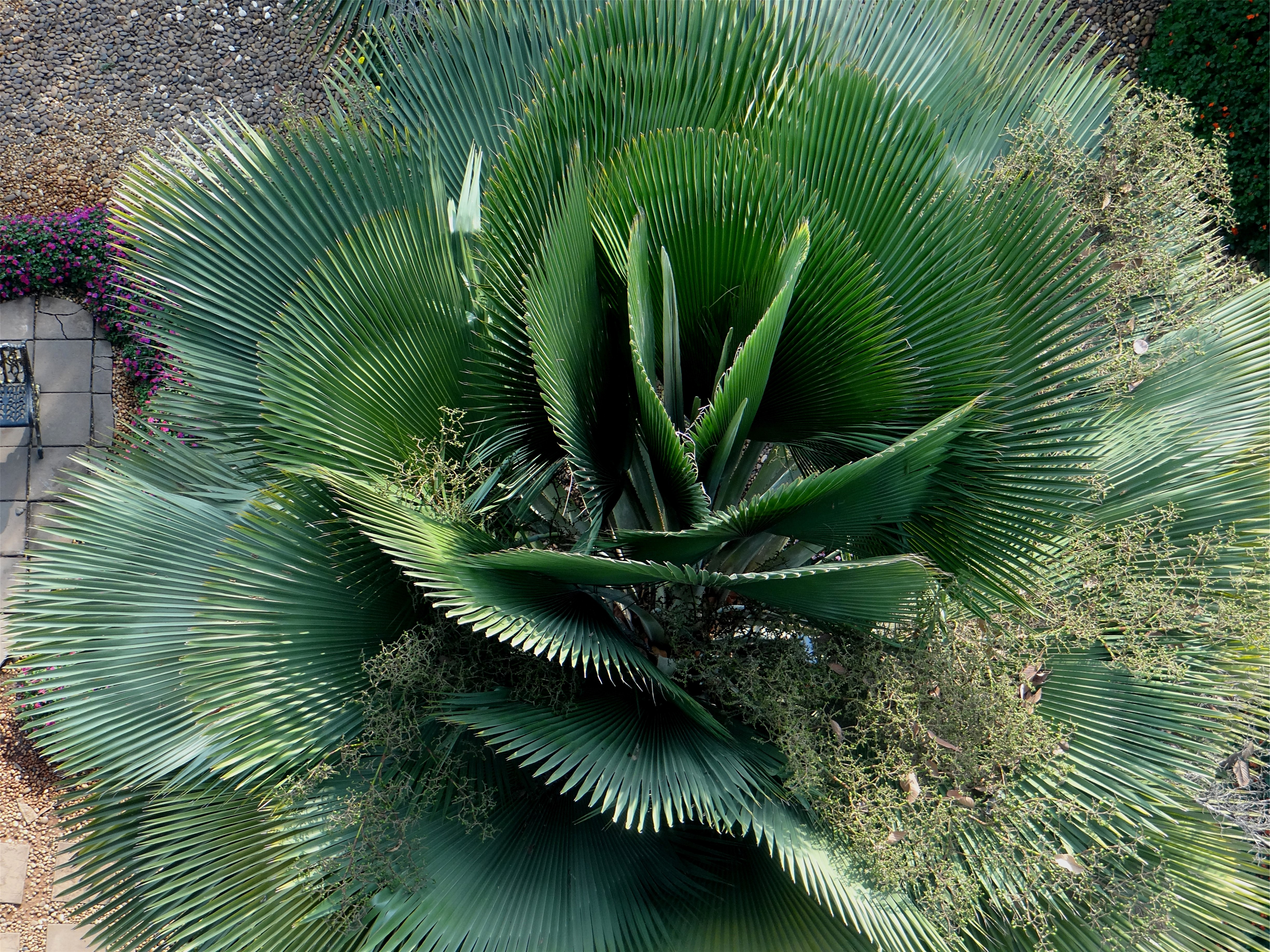 Jardin botanique tropical de Nong Nooch, Thaïlande. Arecaceae vu de dessus depuis une tour d'observation.